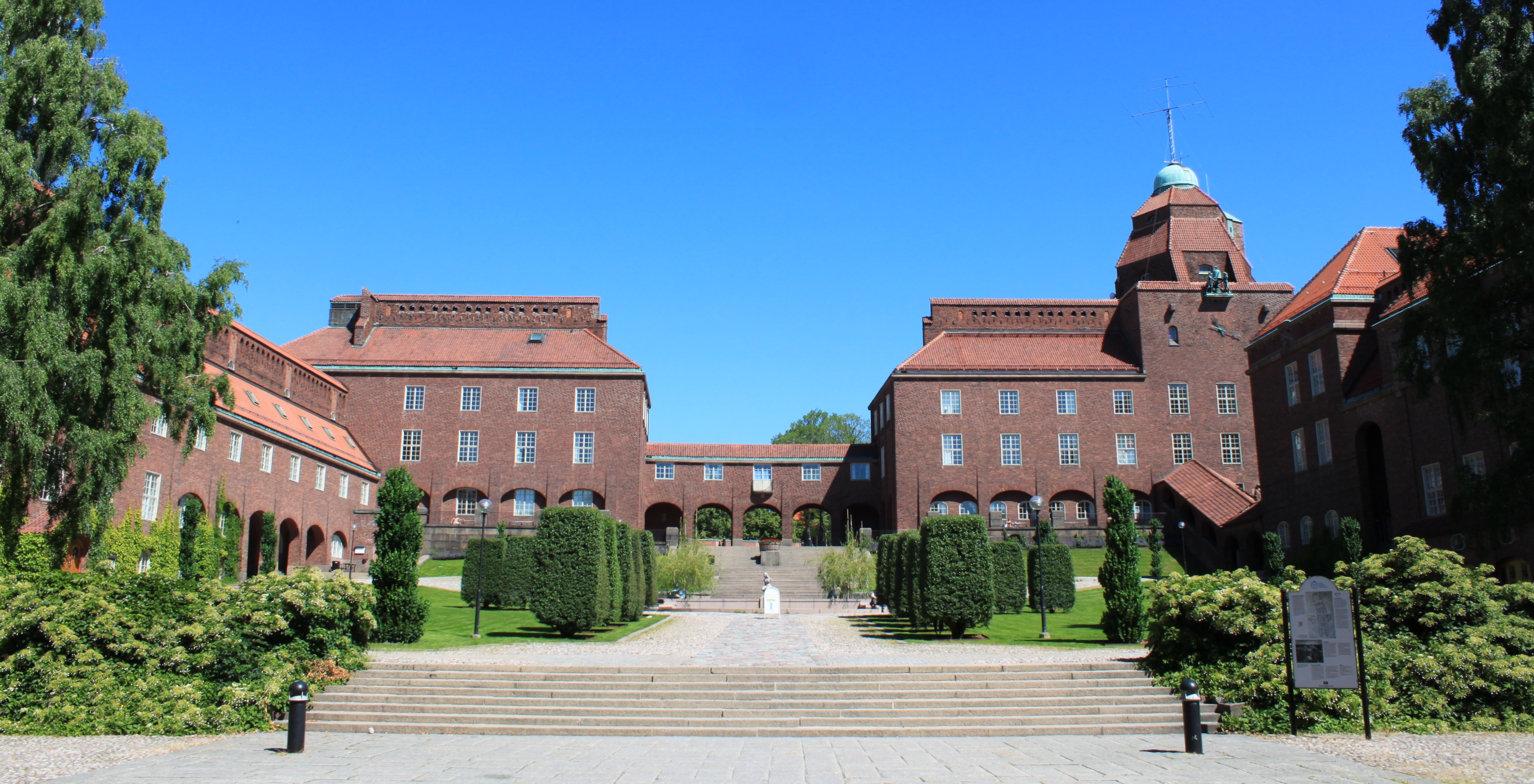 KTH, Stokcholm, Suède